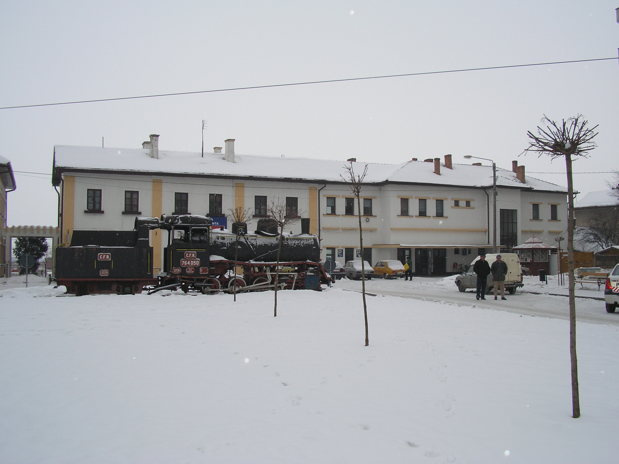 Locomotivă cu abur din faţa gării din Salonta